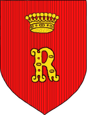 Беларуская (тарашкевіца): Герб Ракава